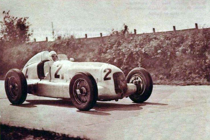 Rudolf Carraciola au Grand Prix de l'ACF 1935.